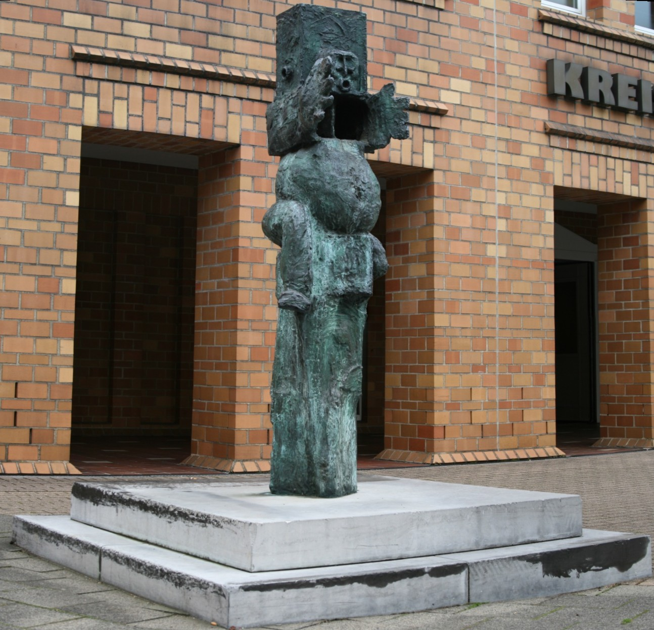 Skulptur "Kasper" in der Skulpturensammlung Viersen. Selbst fotografiert, aus 2 Nahaufnahmen zusammengesetzt.